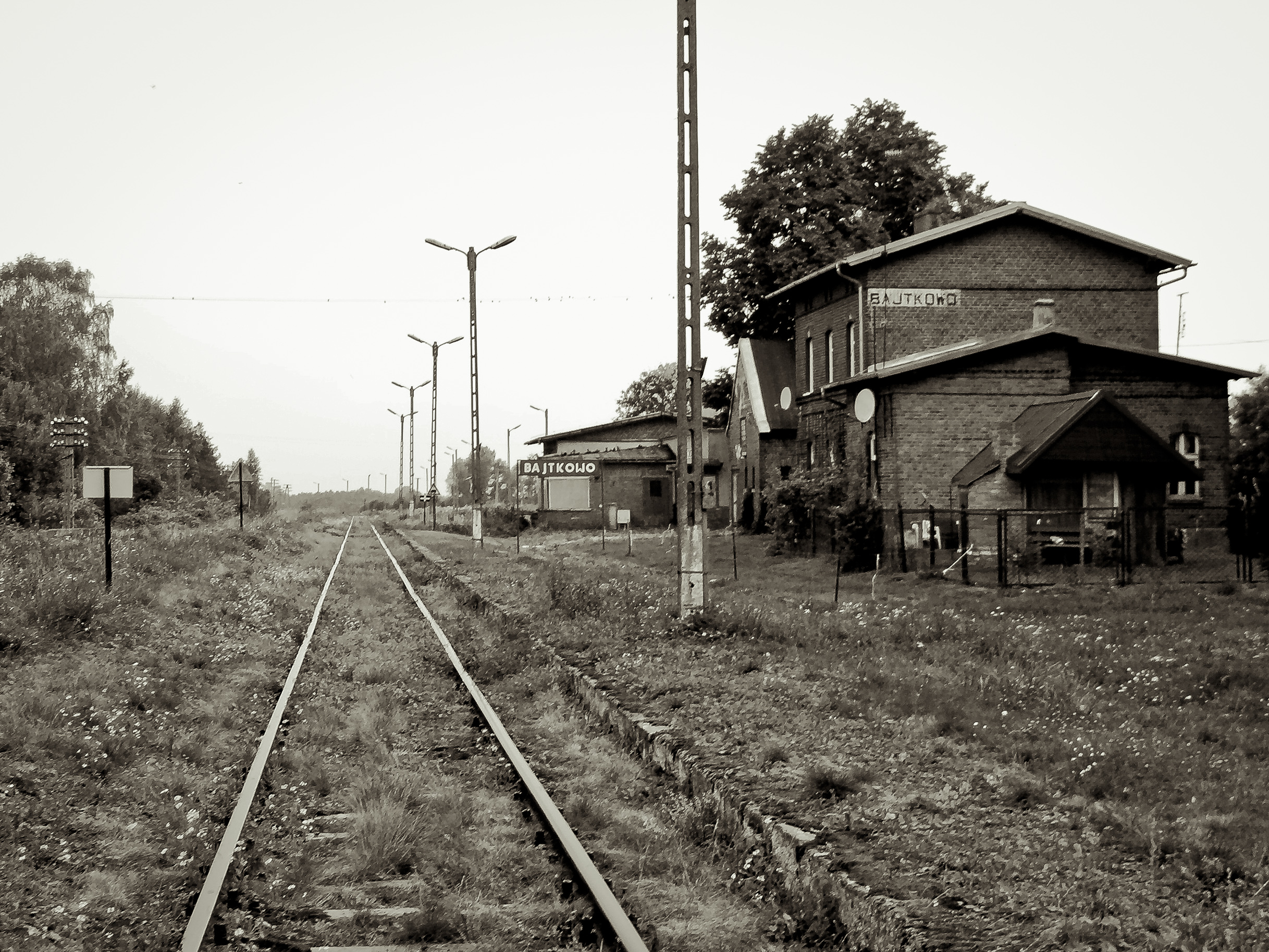 Nieczynna stacja kolejowa w Bajtkowie